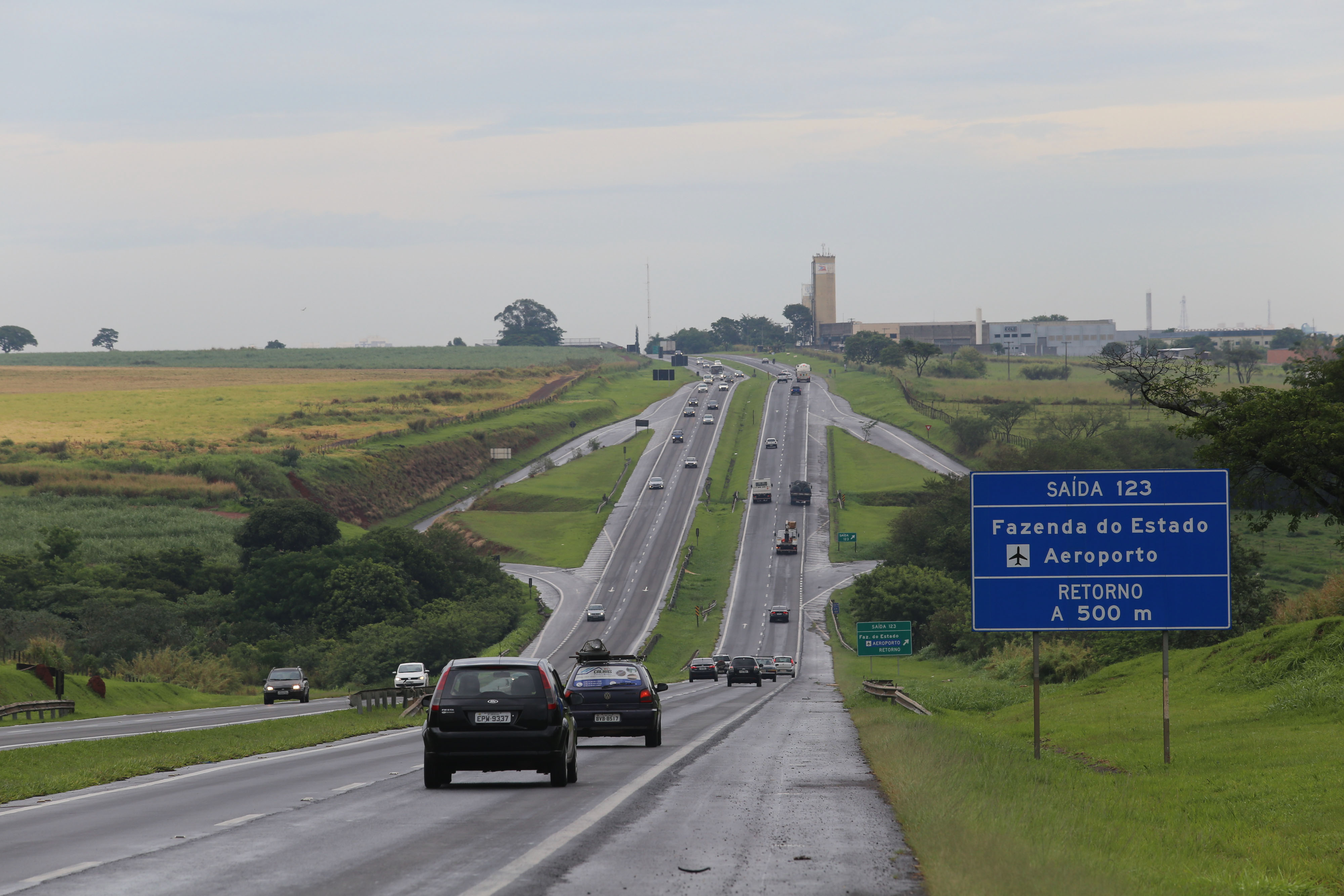 O governador do Estado de São Paulo, dá início às obras de modernização da Rodovia Luiz de Queiróz (SP-304). Local: Americana/SP Data: 17/11/2017 Foto: Gilberto Marques/A2img